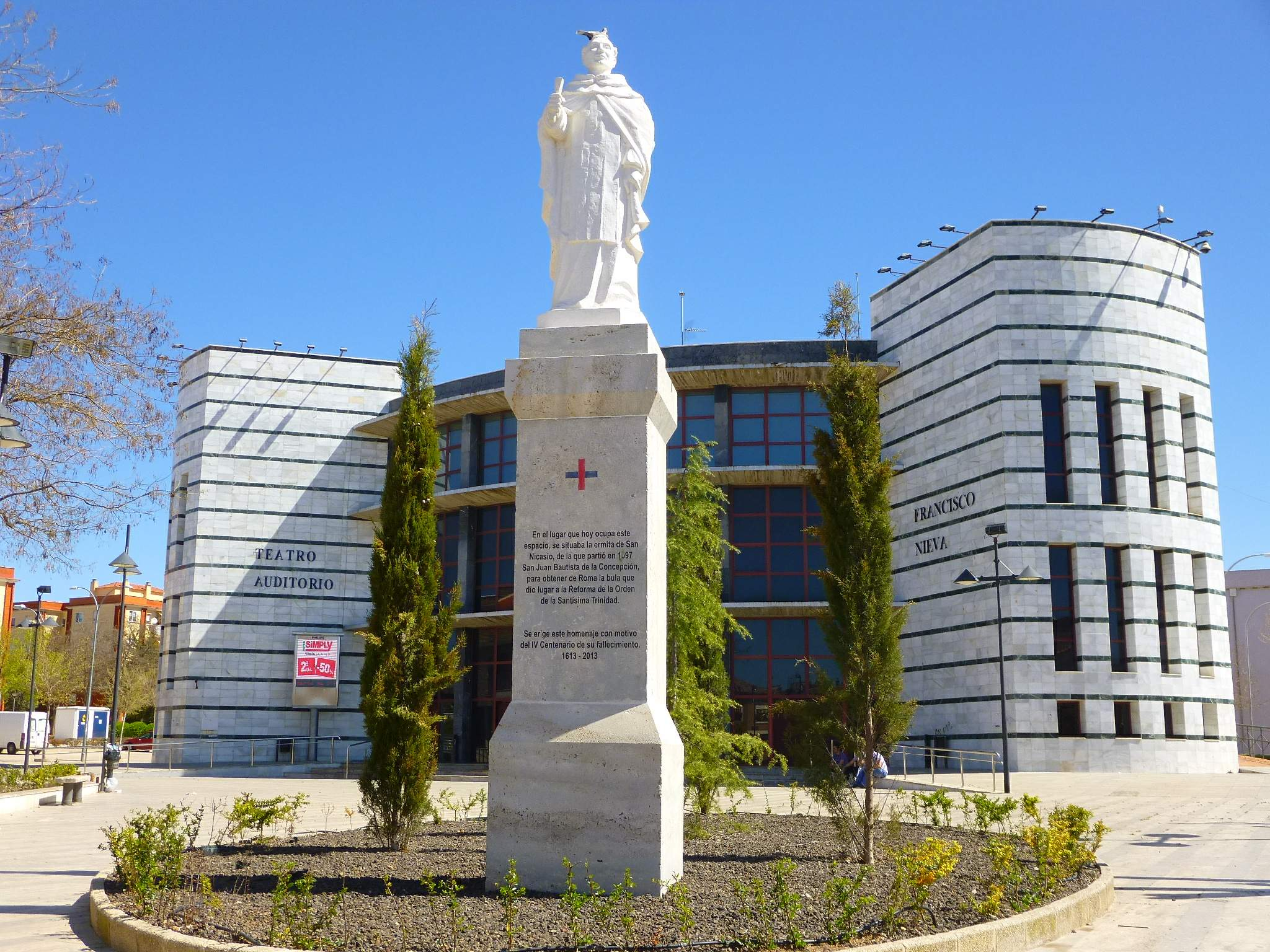 Teatro-Auditorio Francisco Nieva y monumento a San Juan Bautista de la Concepción (Valdepeñas, Ciudad Real)